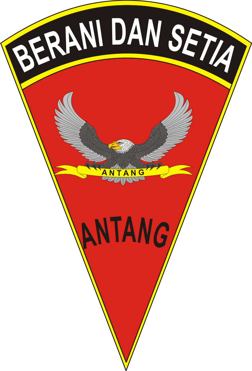 Batalyon Infanteri 631/Antang Elang